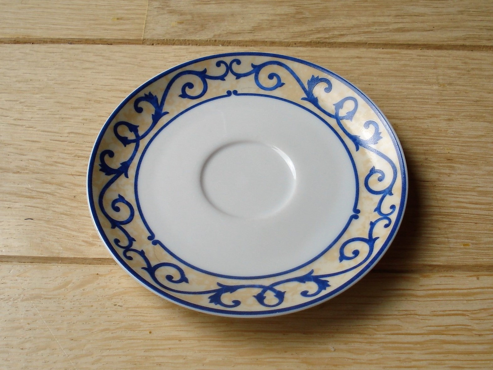 Sous-tasse en porcelaine